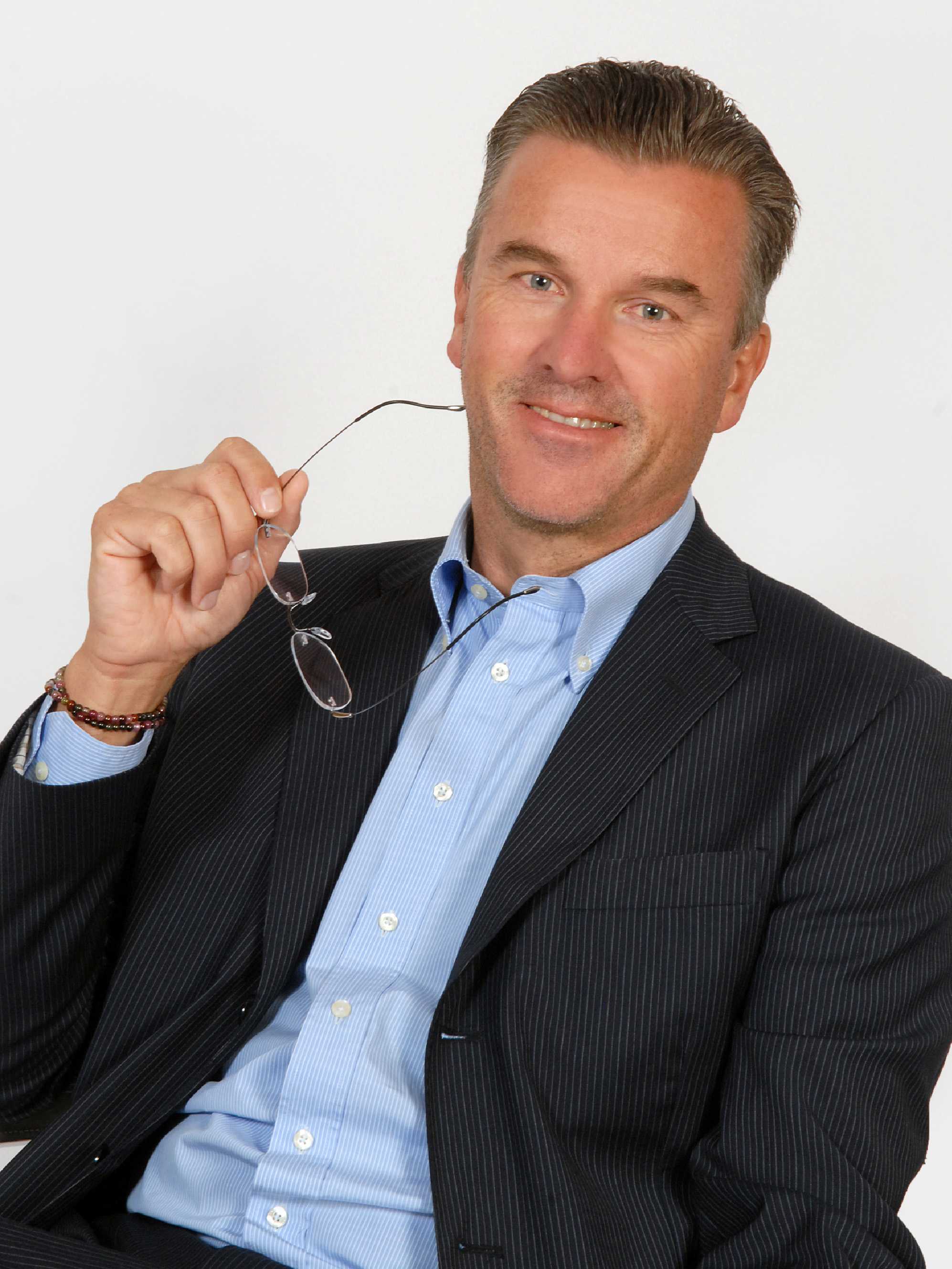 Robert Blunder, Privatfoto